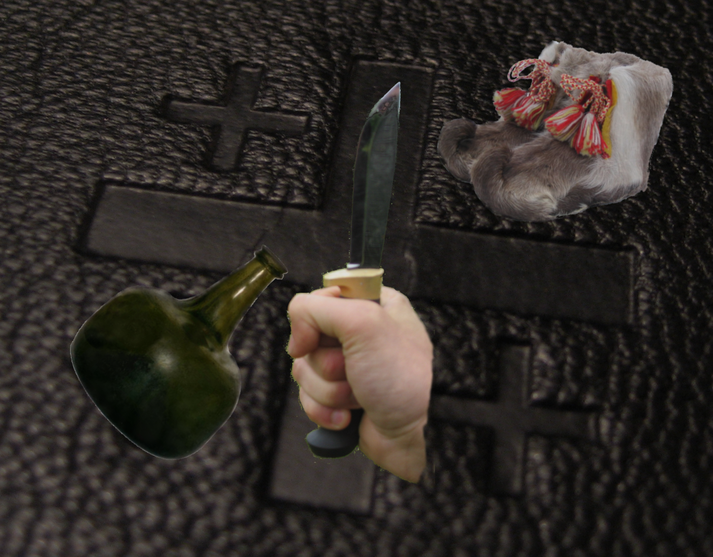 Illustrasjon til Kautokeino-opprøret.